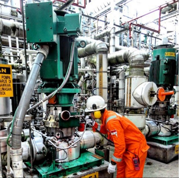 Seorang operator lapangan sedang mengecek pompa di suatu unit produksi gas alam cair.